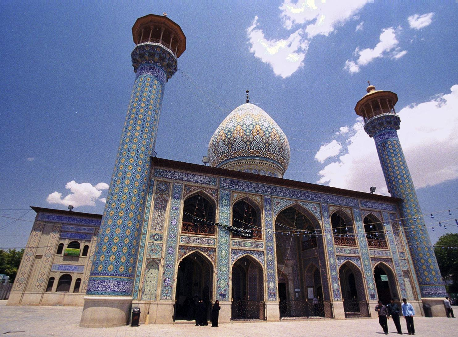 Nasir-ol-Molk Mosque, Shiraz, Iran